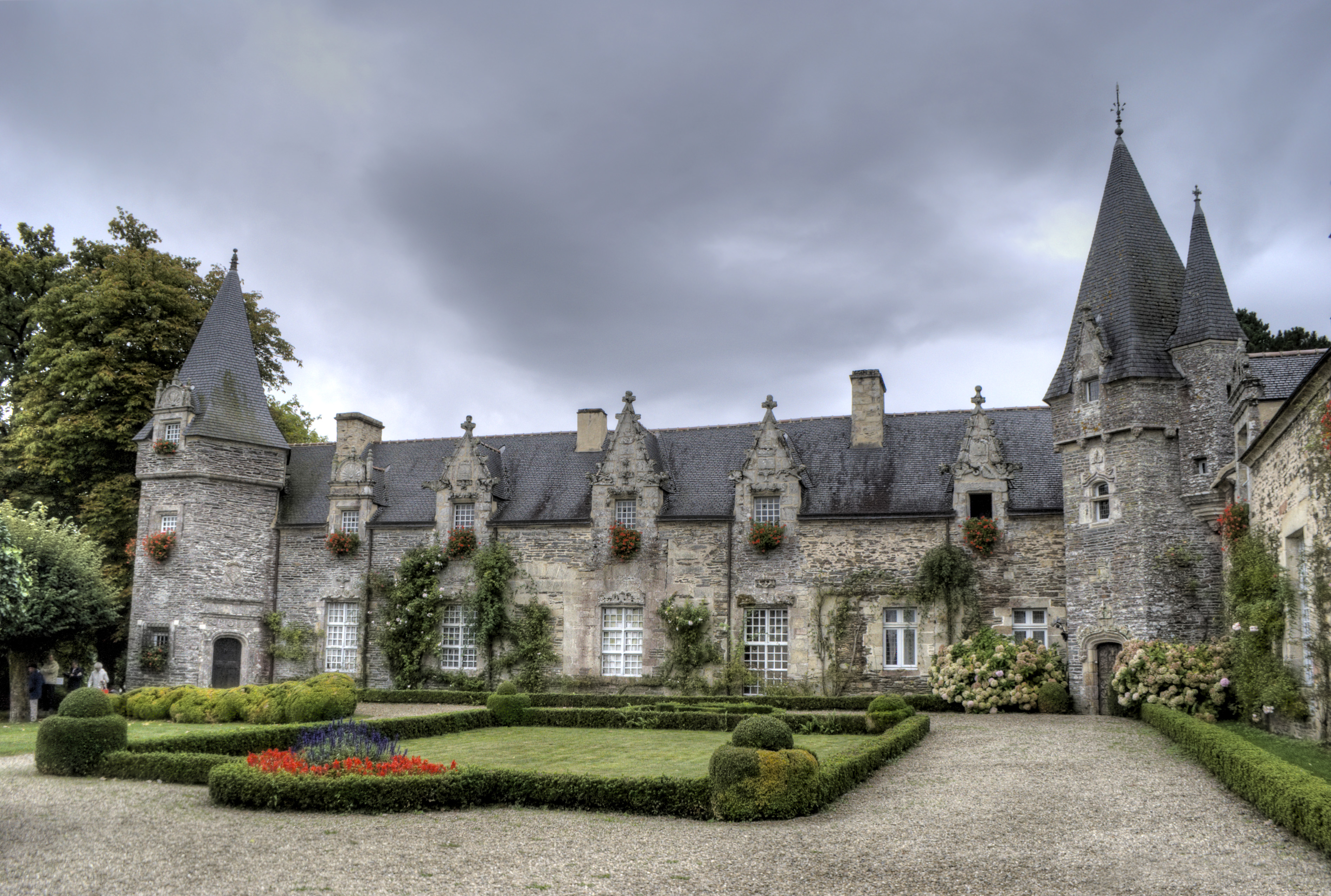 Edifié sur un éperon rocheux qui domine la ville et la vallée du Gueuzon, le premier château de Rochefort en Terre était l'oeuvre des seigneurs de Rochefort apparus au 12e siècle. Tenu à partir de 1374 par les Rieux, l'une des plus puissantes familles de la Bretagne ducale, le château de Rochefort présente un plan pentagonal allongé dont les quatre côtés subsistent. Pillé et ruiné à la fin du 18e siècle, le château fut acquis en 1907 par le peintre américain Alfred Klots, qui transforma les anciens communs en manoir néo-gothique avec des matériaux de remploi. En 1978, la propriété a été acquise par le Département. .